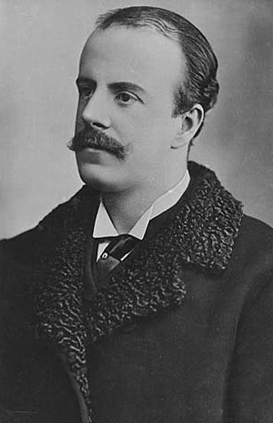 Alexander William George Duff, 1. Herzog von Fife